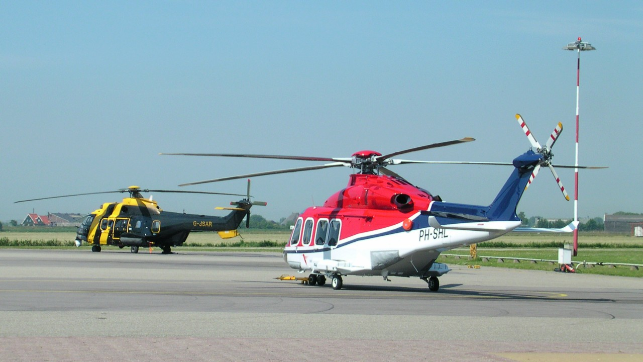 Twee helikopters van het Vliegveld de Kooy. Two of the helicopters on airport De Kooy.